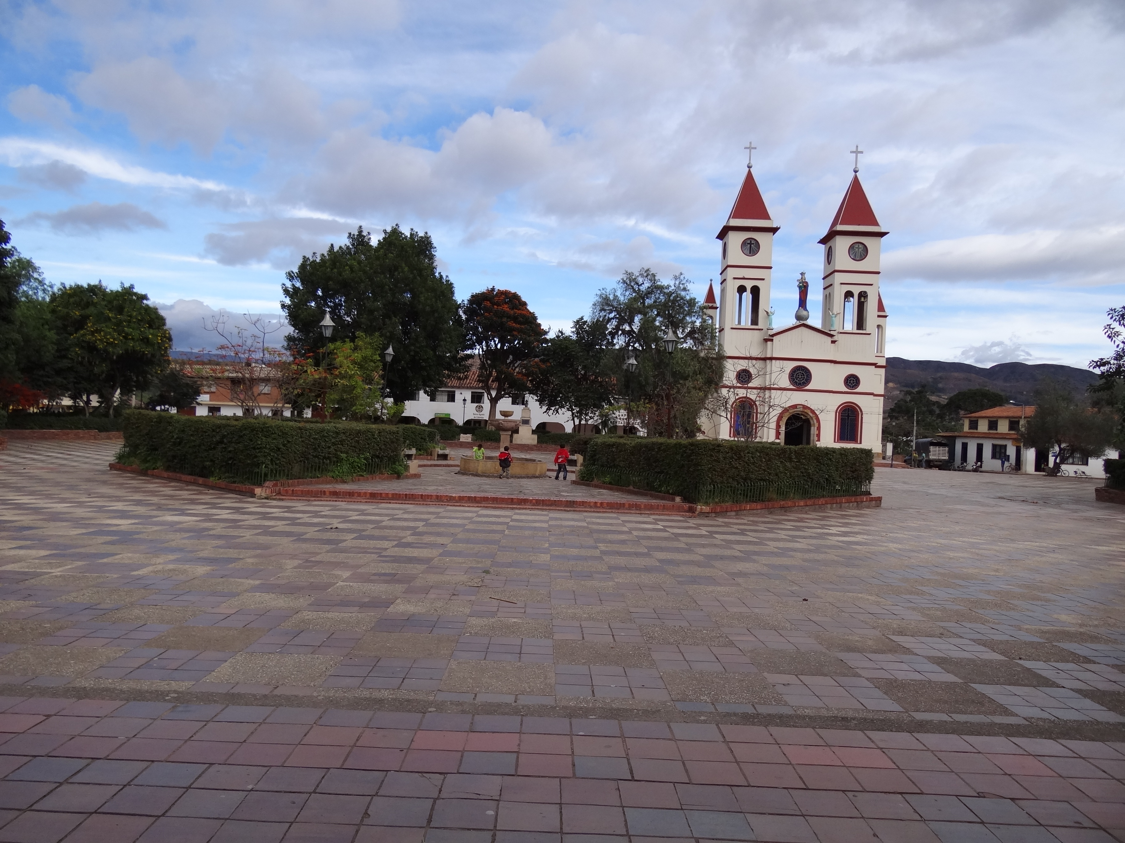 Parque principal del municipio de Sutamarchan, departamento de Boyacá, Colombia